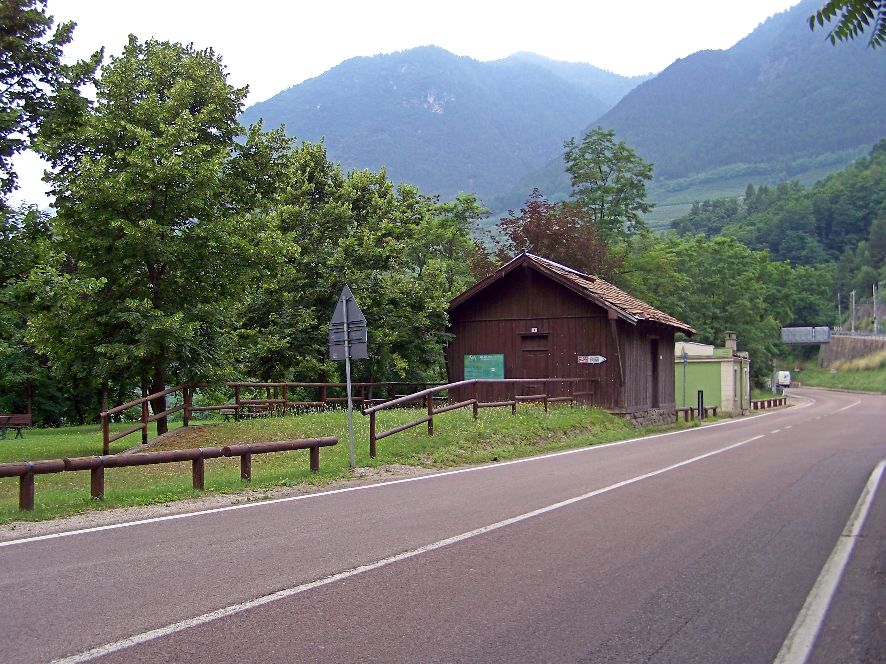 Il piano caricatore, oramai ricoperto di erba e il magazzino merci in legno della stazione tranviaria di Mostizzolo